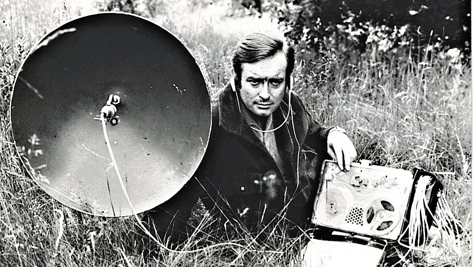 Oldřich Unger s magnetofonem Nagra III a parabolickým mikrofonem, s nímž strávil stovky hodin při nahrávání hlasů přírody v terénu. Fotografie z jarního natáčení zvuků u jihočeských rybníků z roku 1970. Foto: Alexandr Janovský, archiv Oldřicha Ungera. Zdroj: Český rozhlas